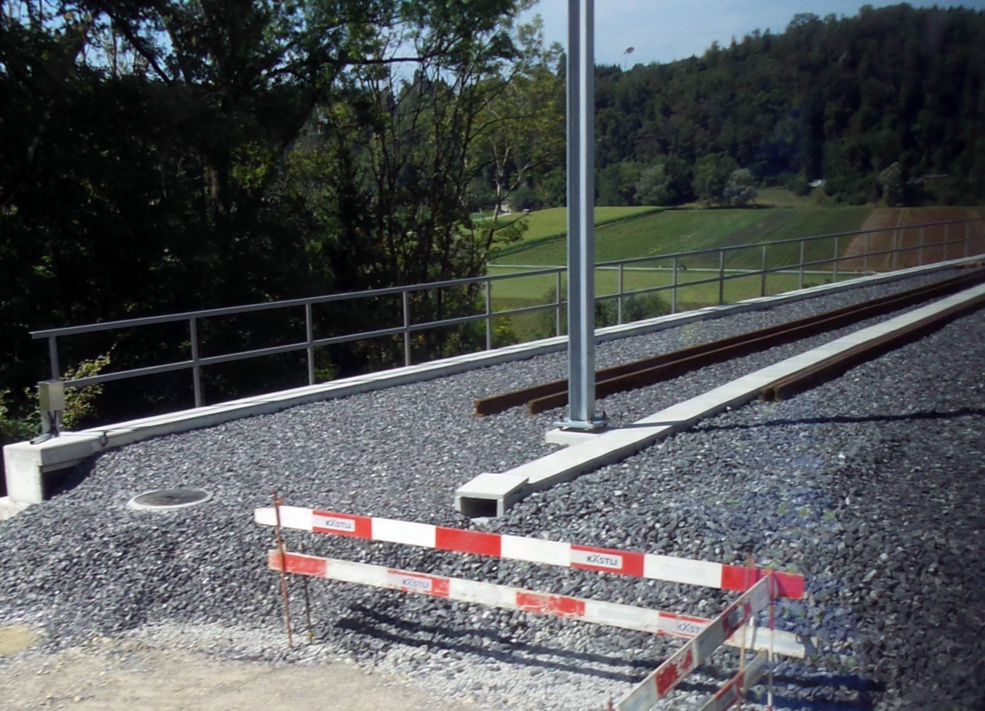 östliches Ende des Saaneviadkt Gümmenen): Gleistrog leicht trapezförmig, da Anfahrt aus Osten leicht geknickt auf den geradeaus gebauten Unterteil der Brücke